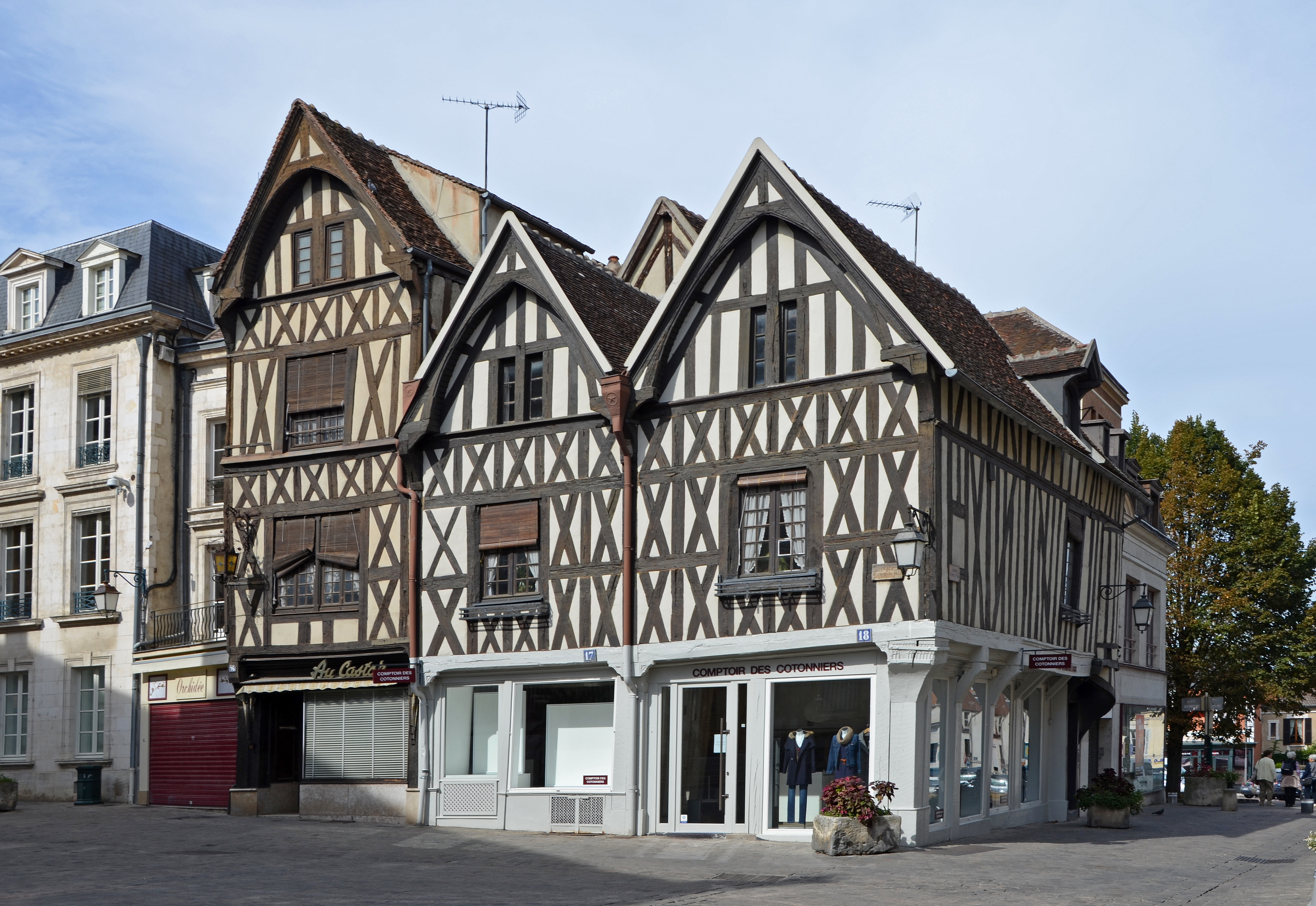 Place de l’Hôtel de Ville à Auxerre, Yonne, Bourgogne, France